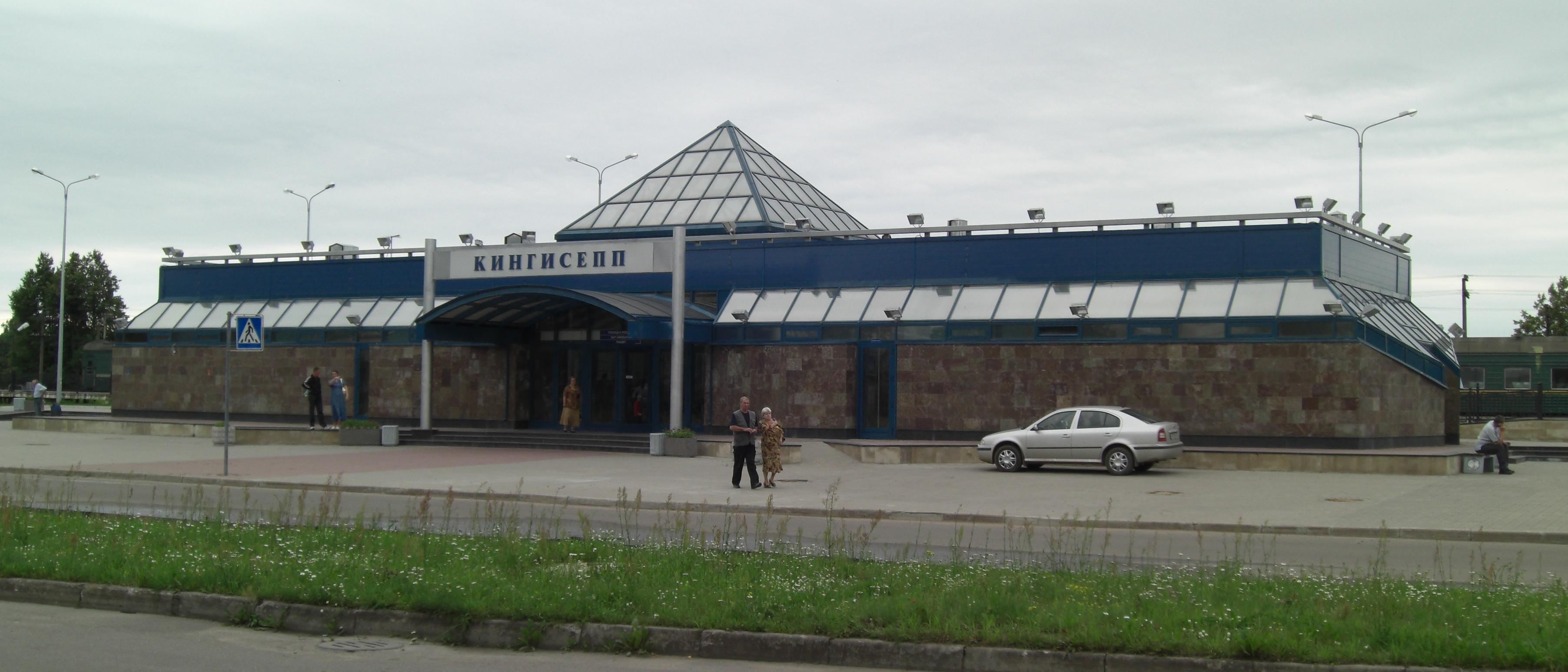 Вокзал в городе Кингисепп Ленинградской области.